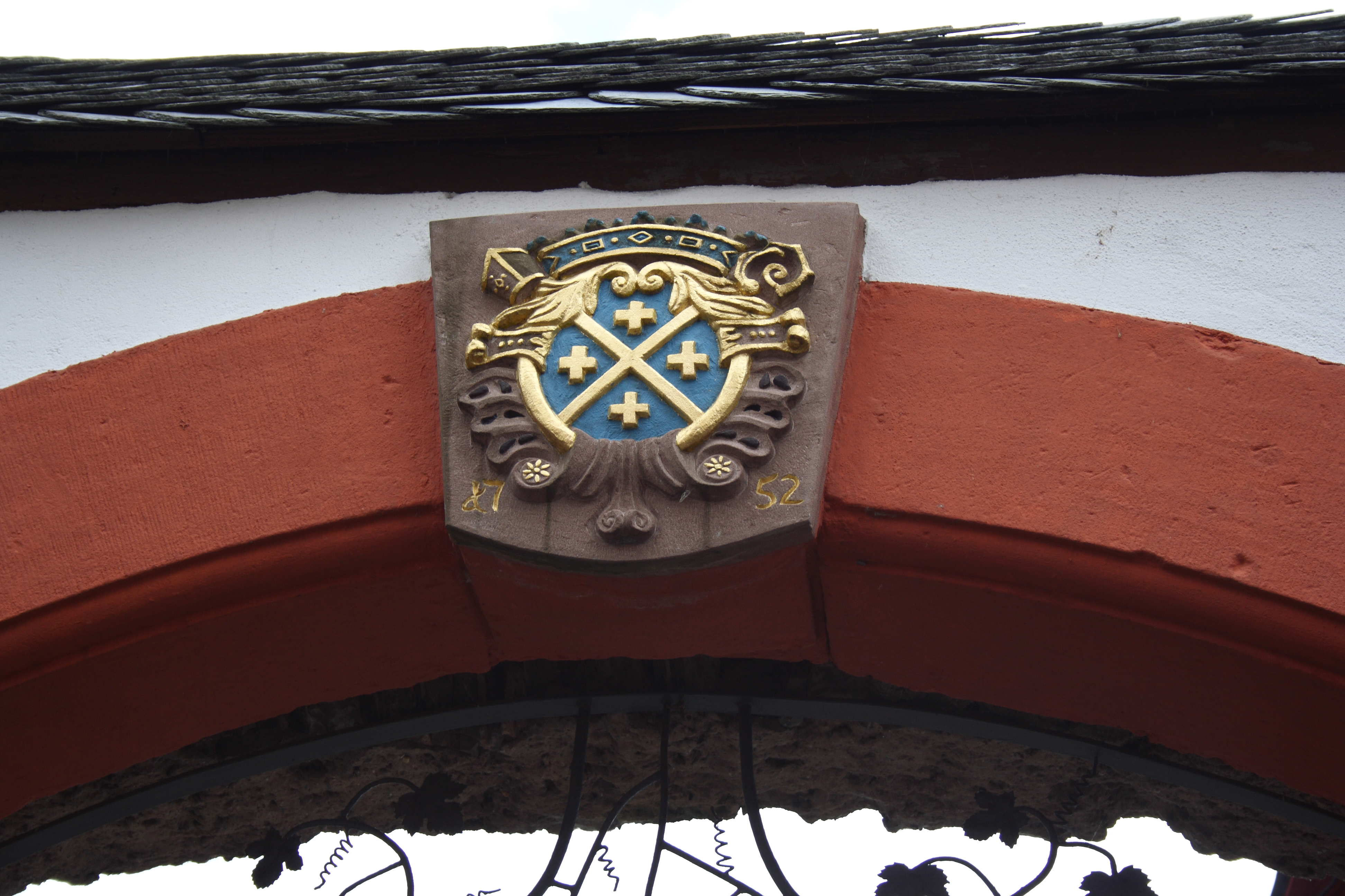 Kirchstraße 15: ehemaliger Springiersbacher Hof und Pfarrhaus in Ediger, einem Ortsteil von Ediger-Eller im Landkreis Cochem-Zell (Rheinland-Pfalz)